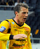 Daniel Nilsson